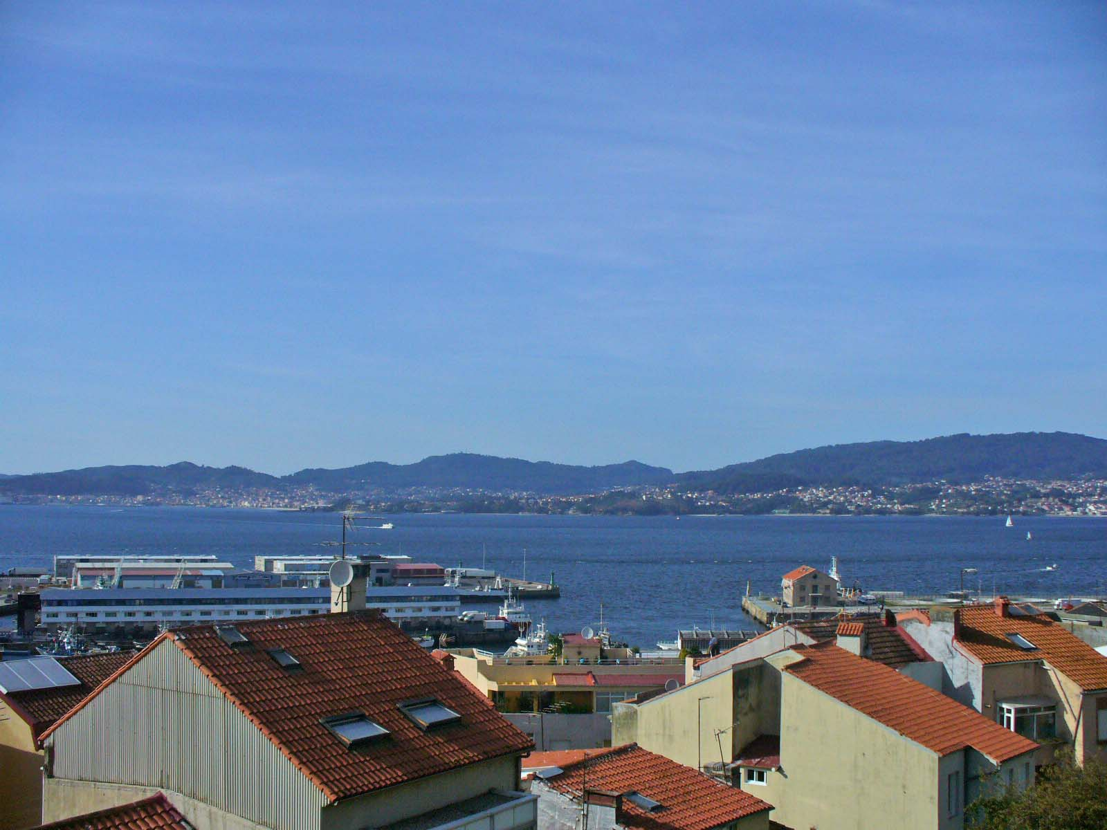 Haveno de Vigo el promenejo Afonso la 12a